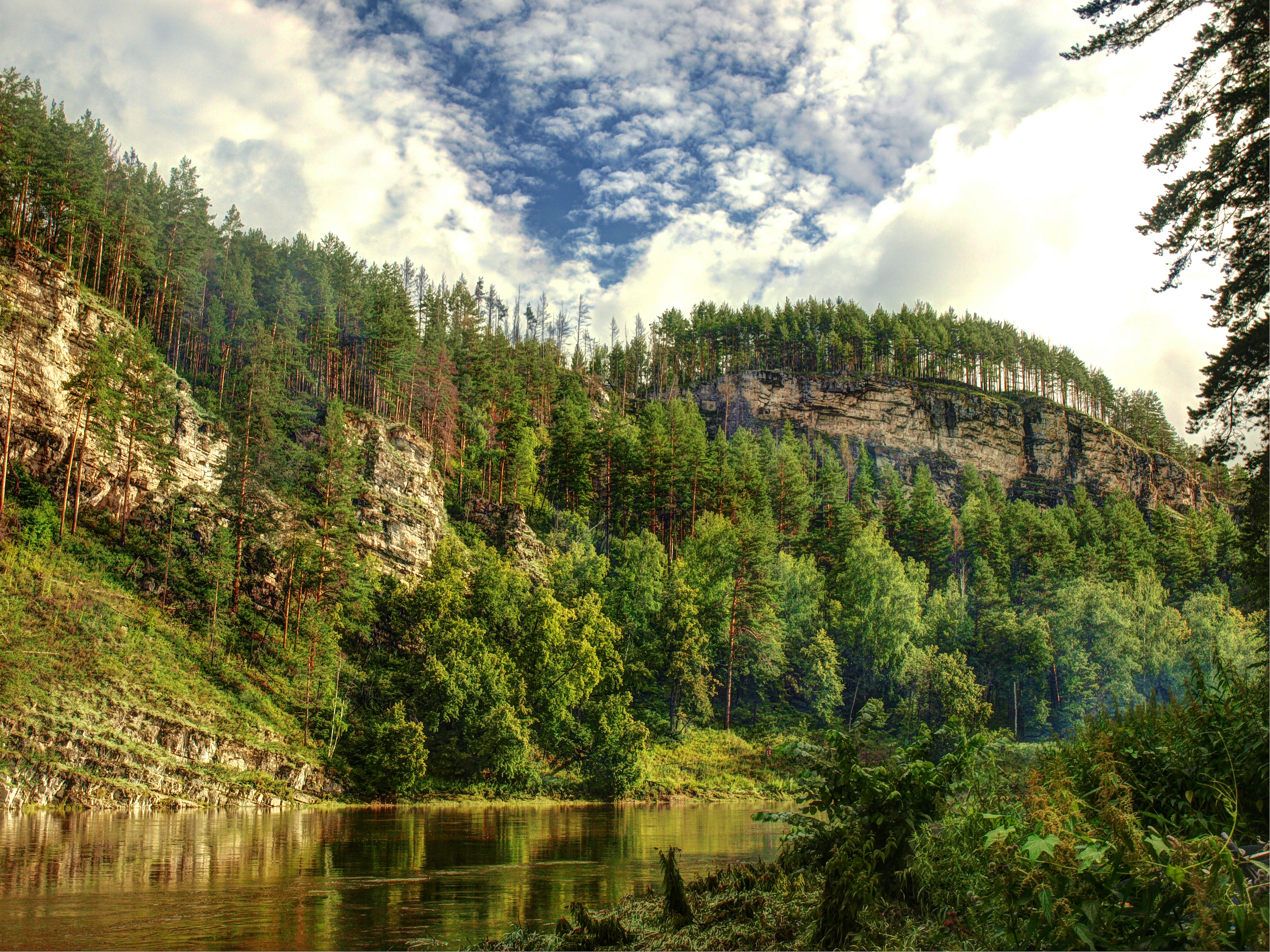 Река Ай от устья реки Бейды до деревни Сикияз-Тамак, Саткинский район This image is related to the protected area of Russia number 7410258